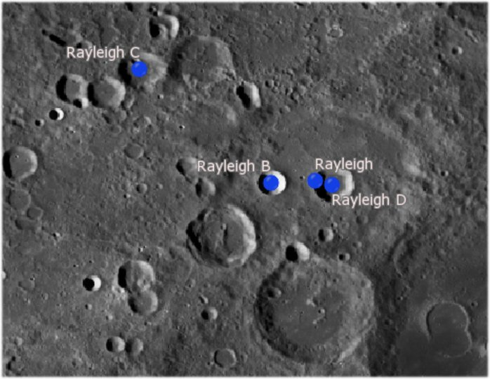 Cráter lunar Rayleigh. Cráteres satélite. (Imagen LRO)